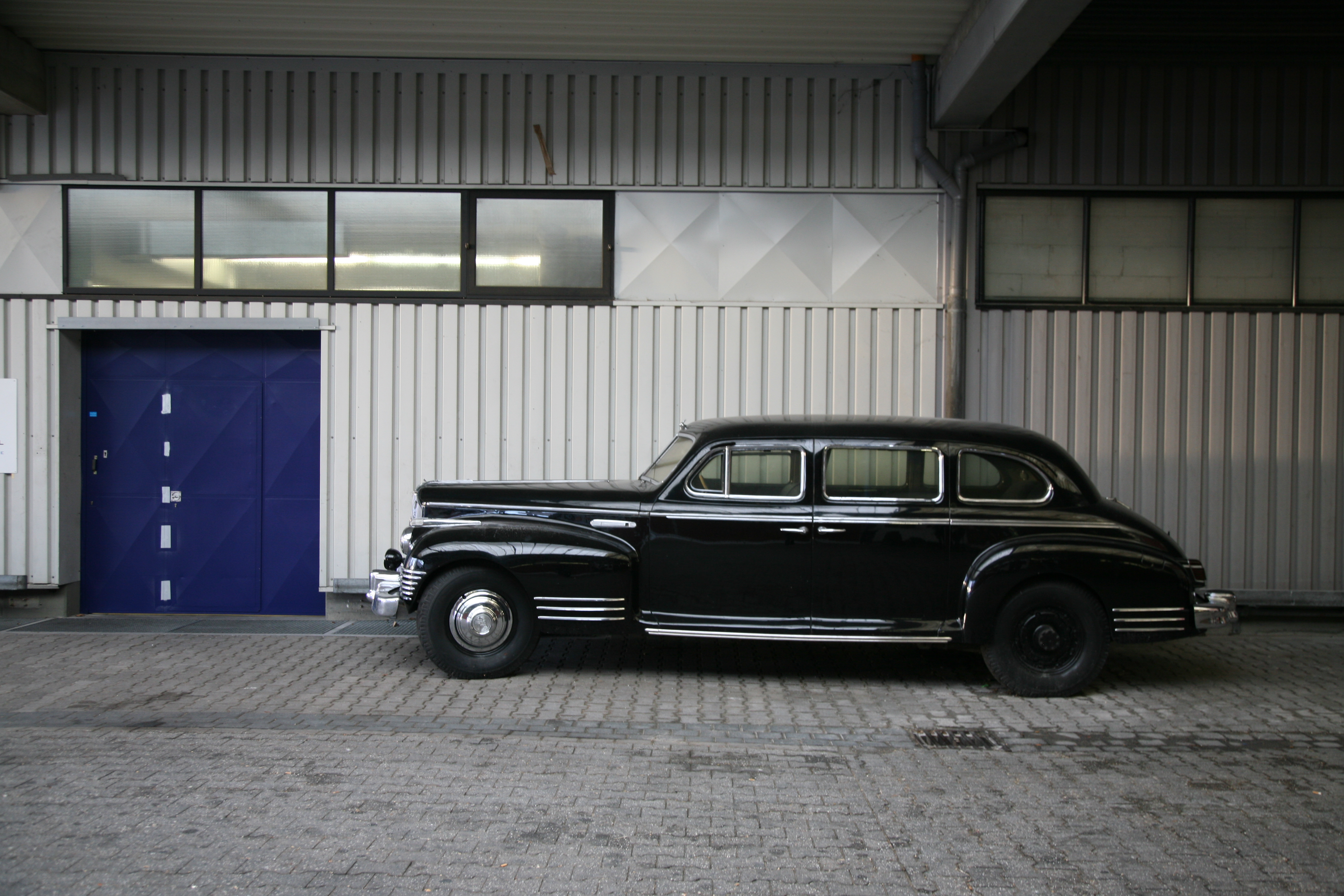 ZiS-110 in Cologne.